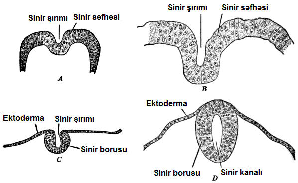 Sinir sisteminin inkişaf dövrləri (Şmalhauzenə görə): A-Sinir səfhəsi; B,C-Sinir şırımı;D-Sinir borusu